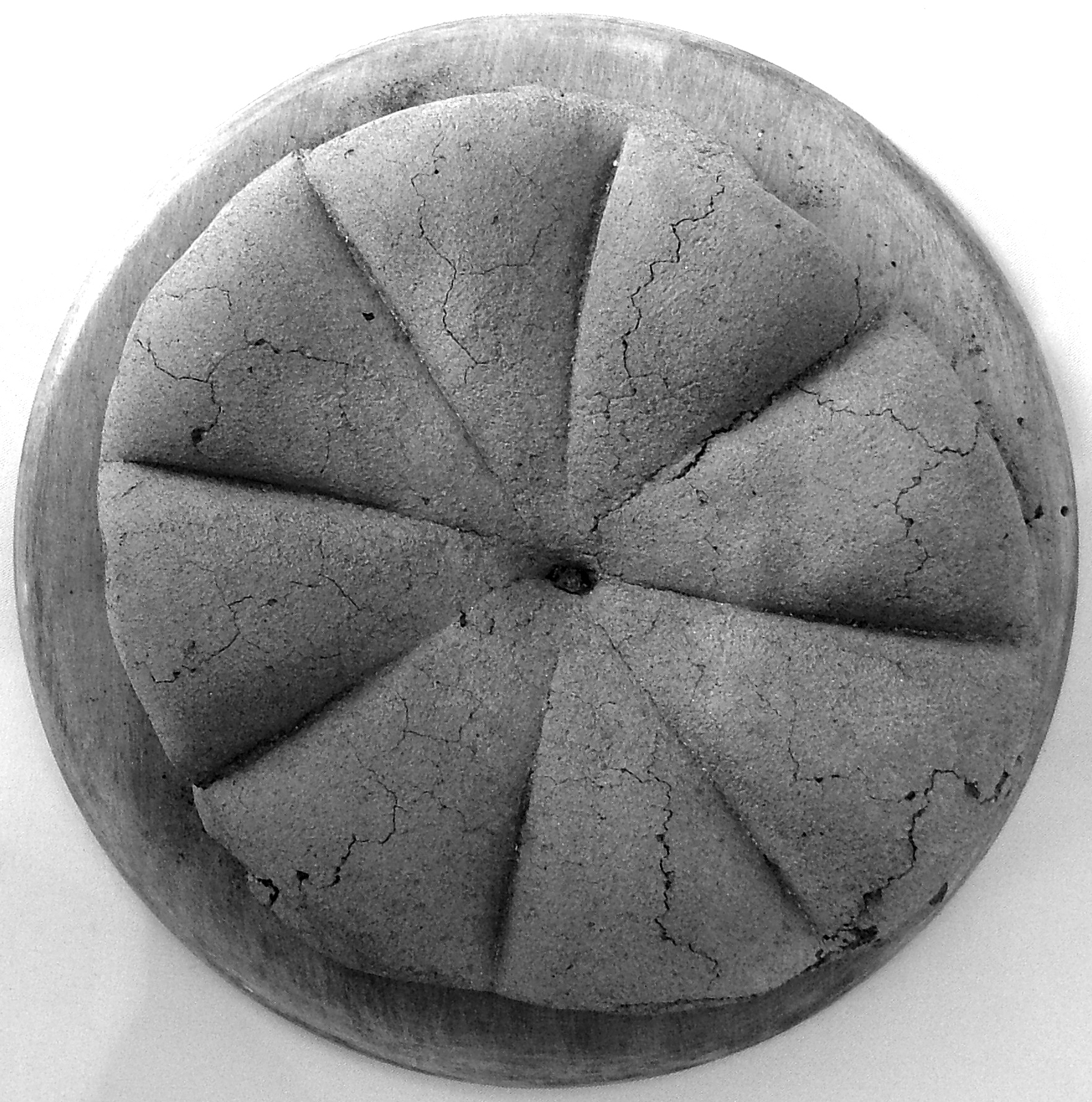 forma di pane trovata a Pompei